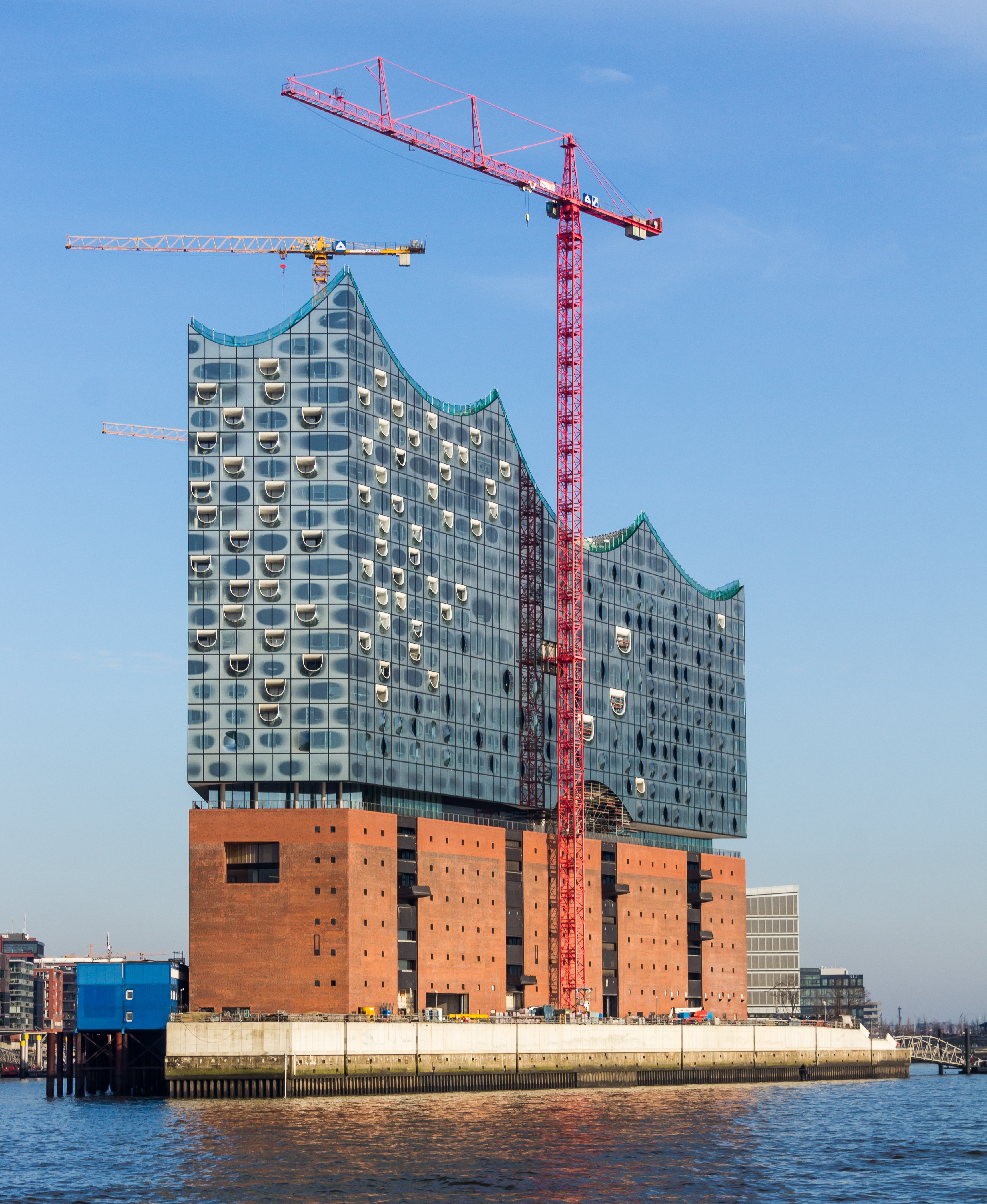 Elbphilharmonie, Februar 2015. Ansicht von der Norderelbe in Richtung HafenCity